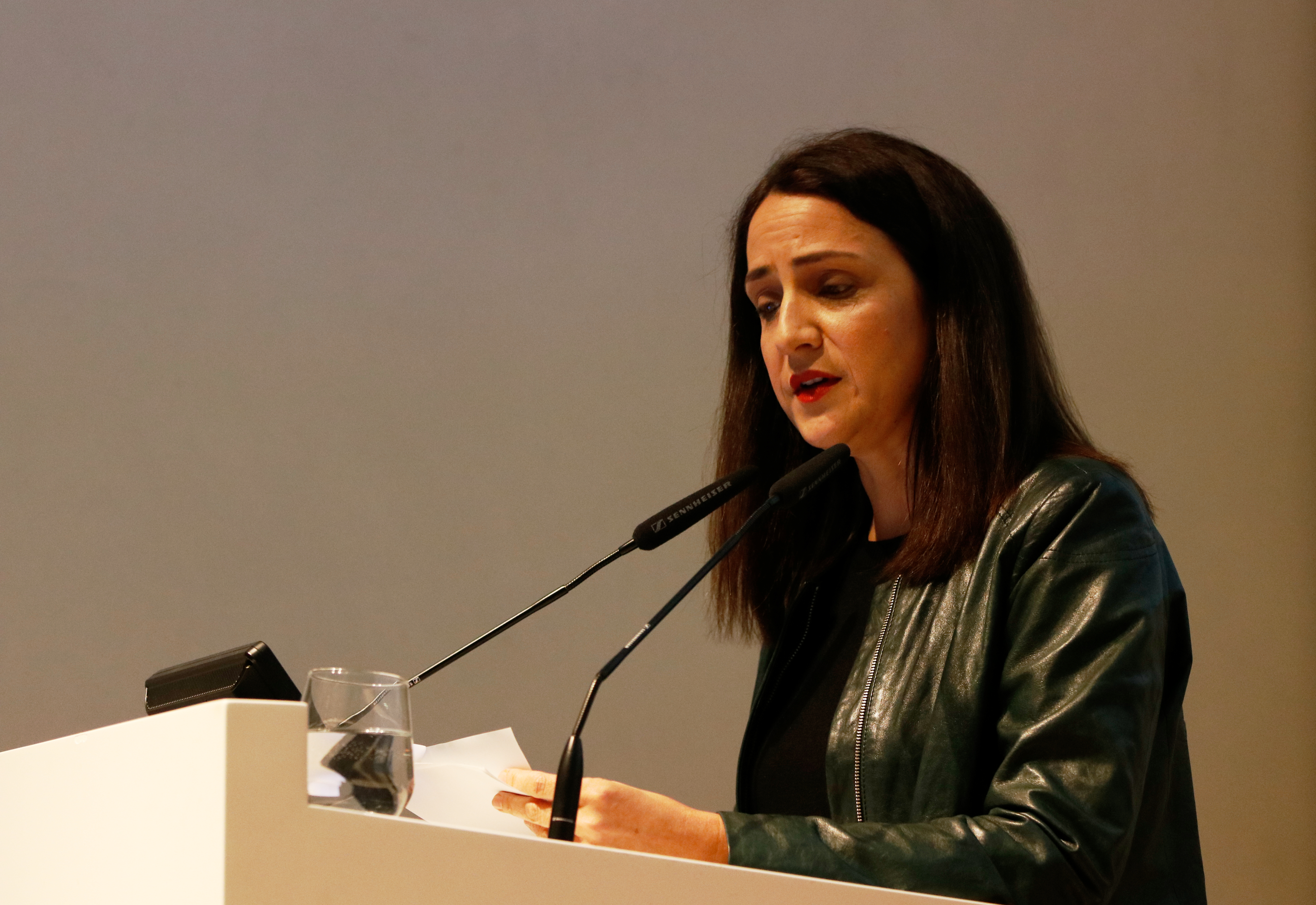 Mirjam Zadoff, Historikerin, seit 2018 Direktorin des NS-Dokuzentrums in München, bei einer Ausstellungseröffnung im NS-Dokuzentrum, 2019-05.29